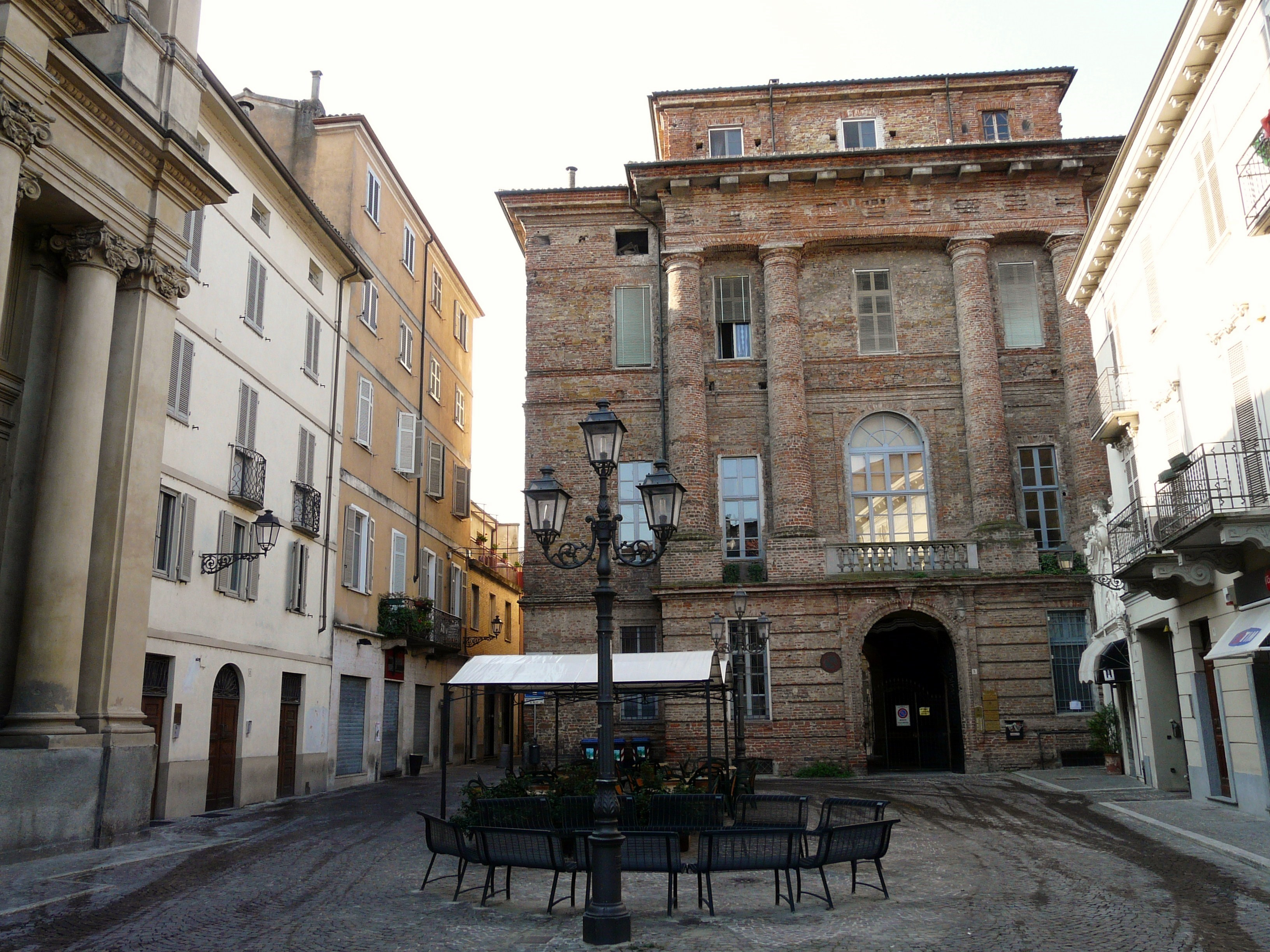 Piazza Santo Stefano, Casale Monferrato, Piemonte, Italia